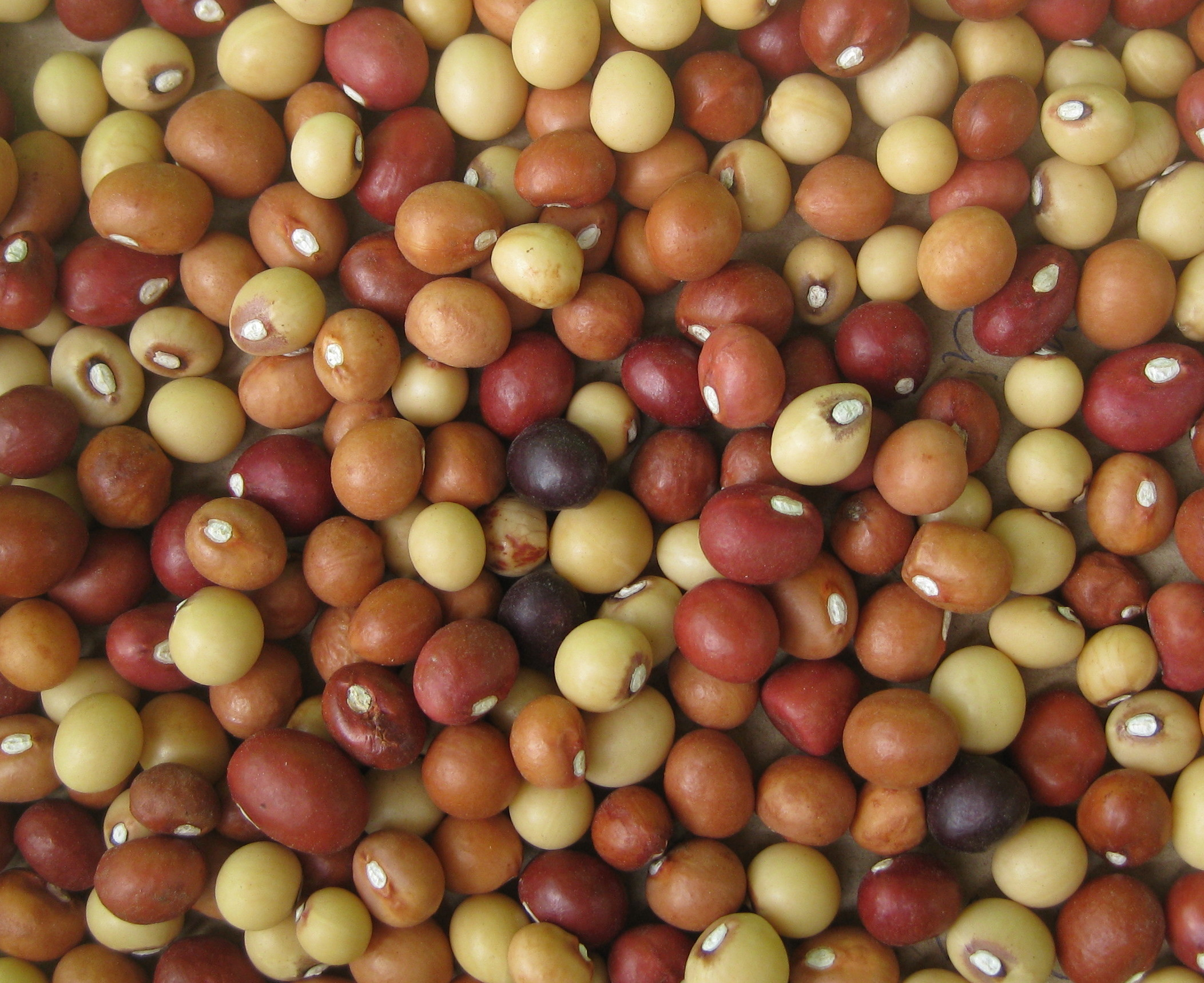 Bambara groundnut (Vigna subterranea) from Buzi district in Mozambique. Name in Mozambique: "feijão jugo"